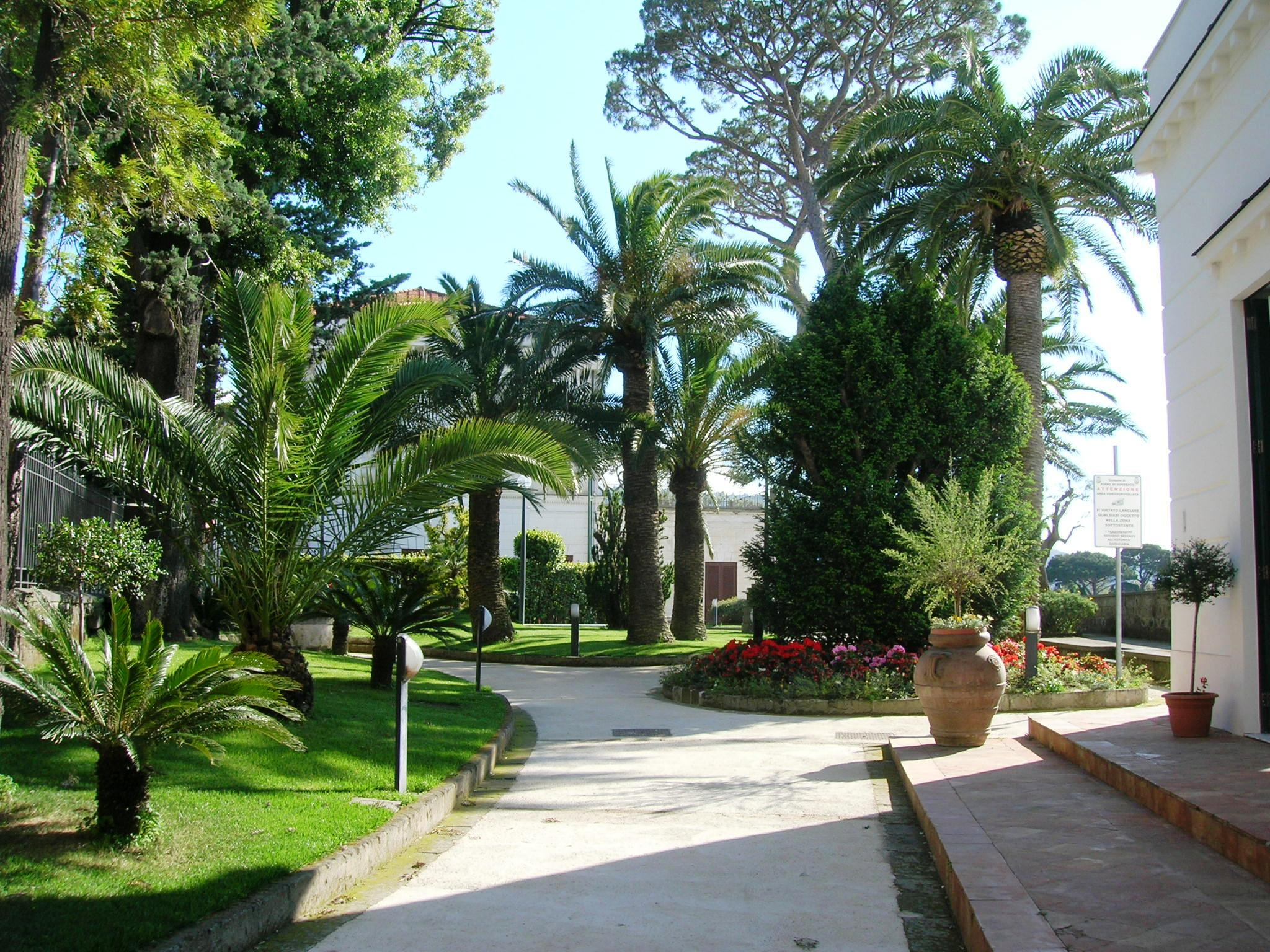 Villa Fondi De Sangro a Piano di Sorrento